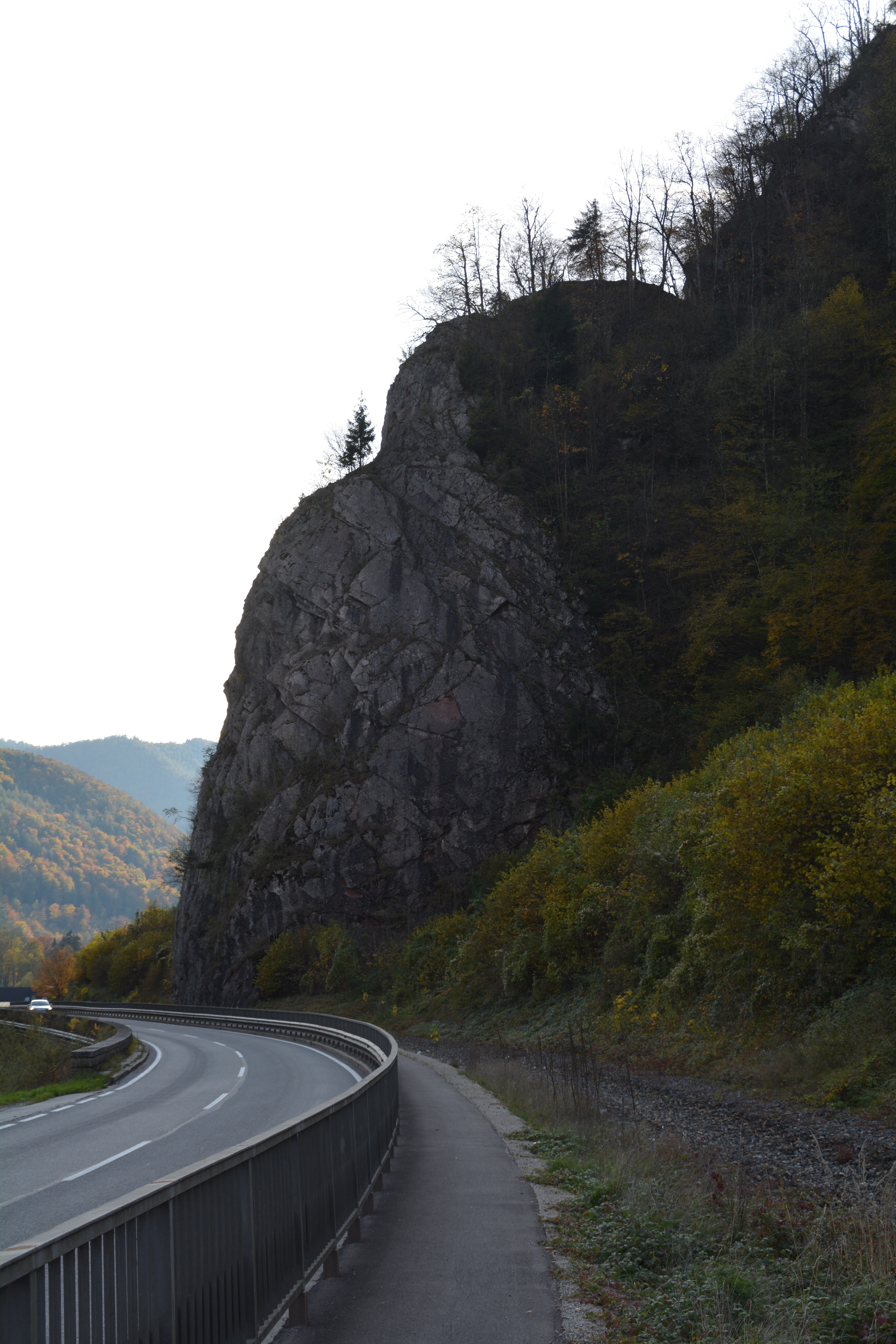 Felspartien This media shows the natural monument in Lower Austria with the ID SB-006.